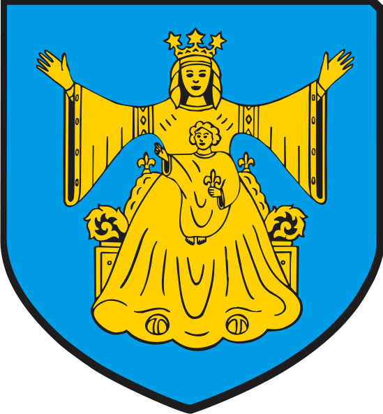 Blason ville de Bischwiller